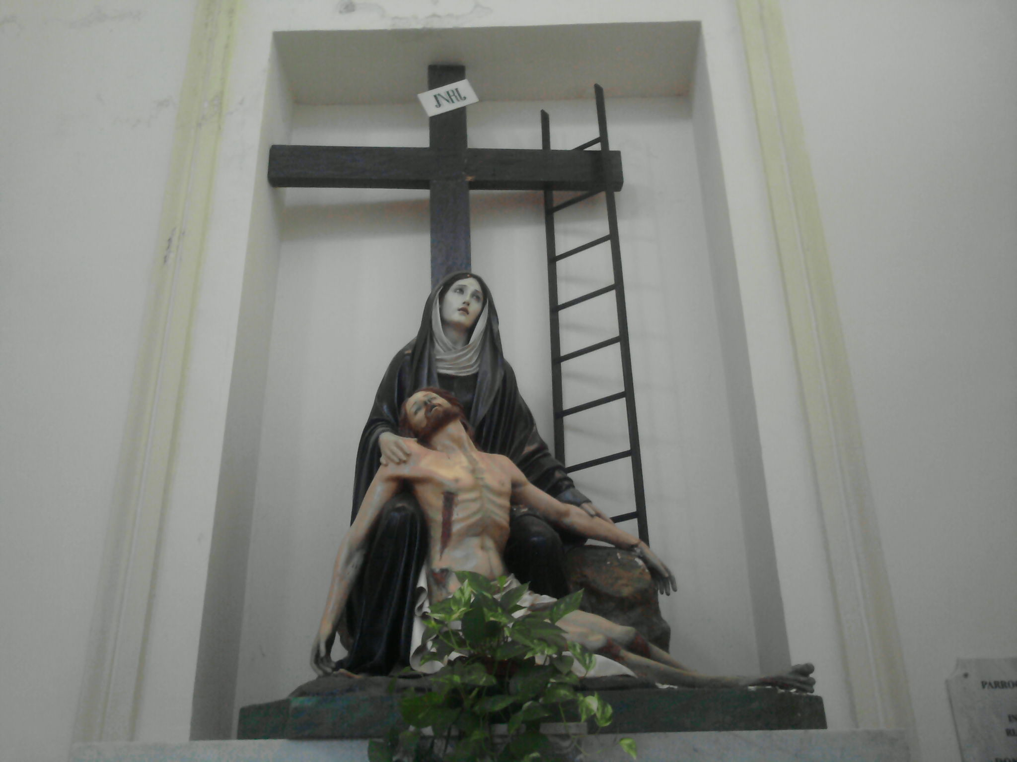 Statua dell'Addolorata custodita nella chiesa di Maria Santissima del Soccorso di Palmi